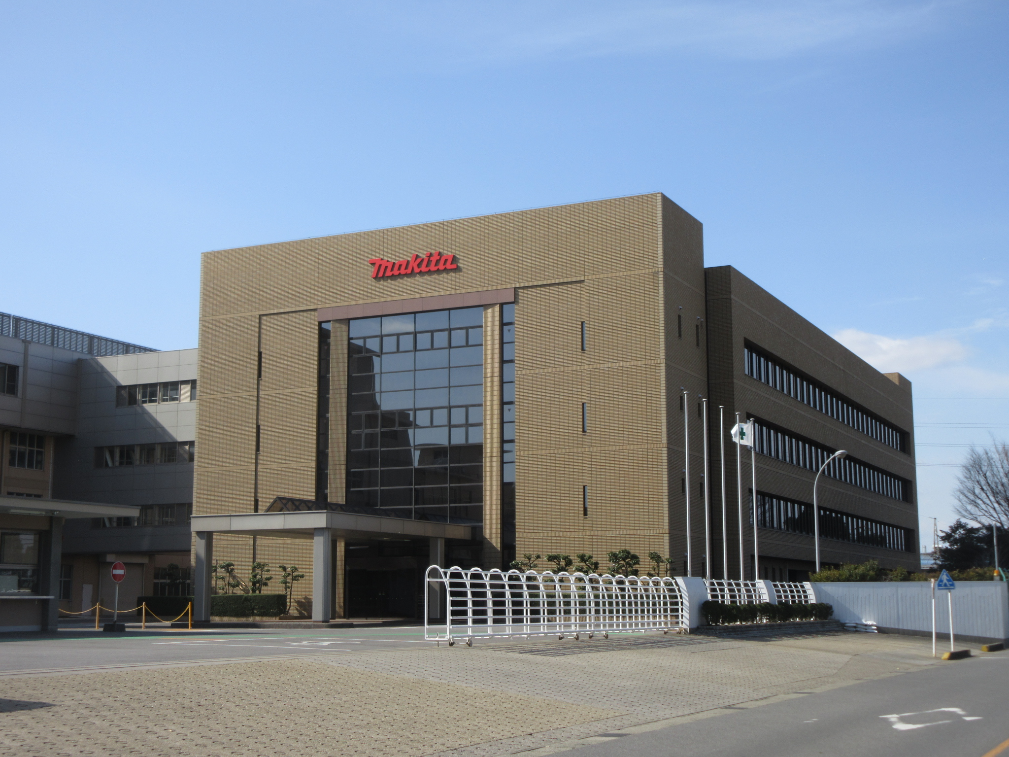 マキタ岡崎工場（岡崎市合歓木町）